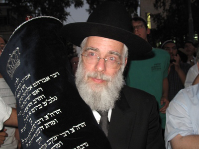 הרב יעקב שפירא בהכנסת ספר תורה